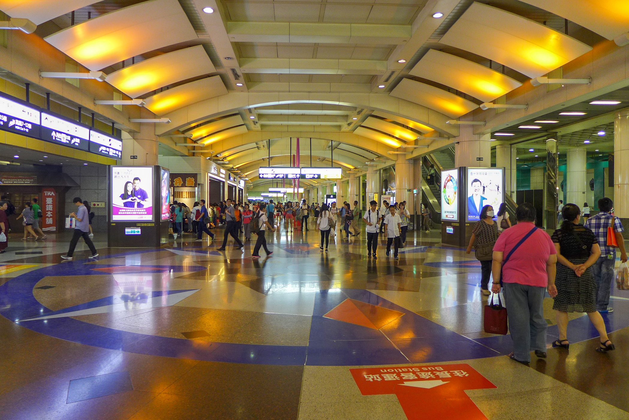 Banqiao Station Basement Concourse